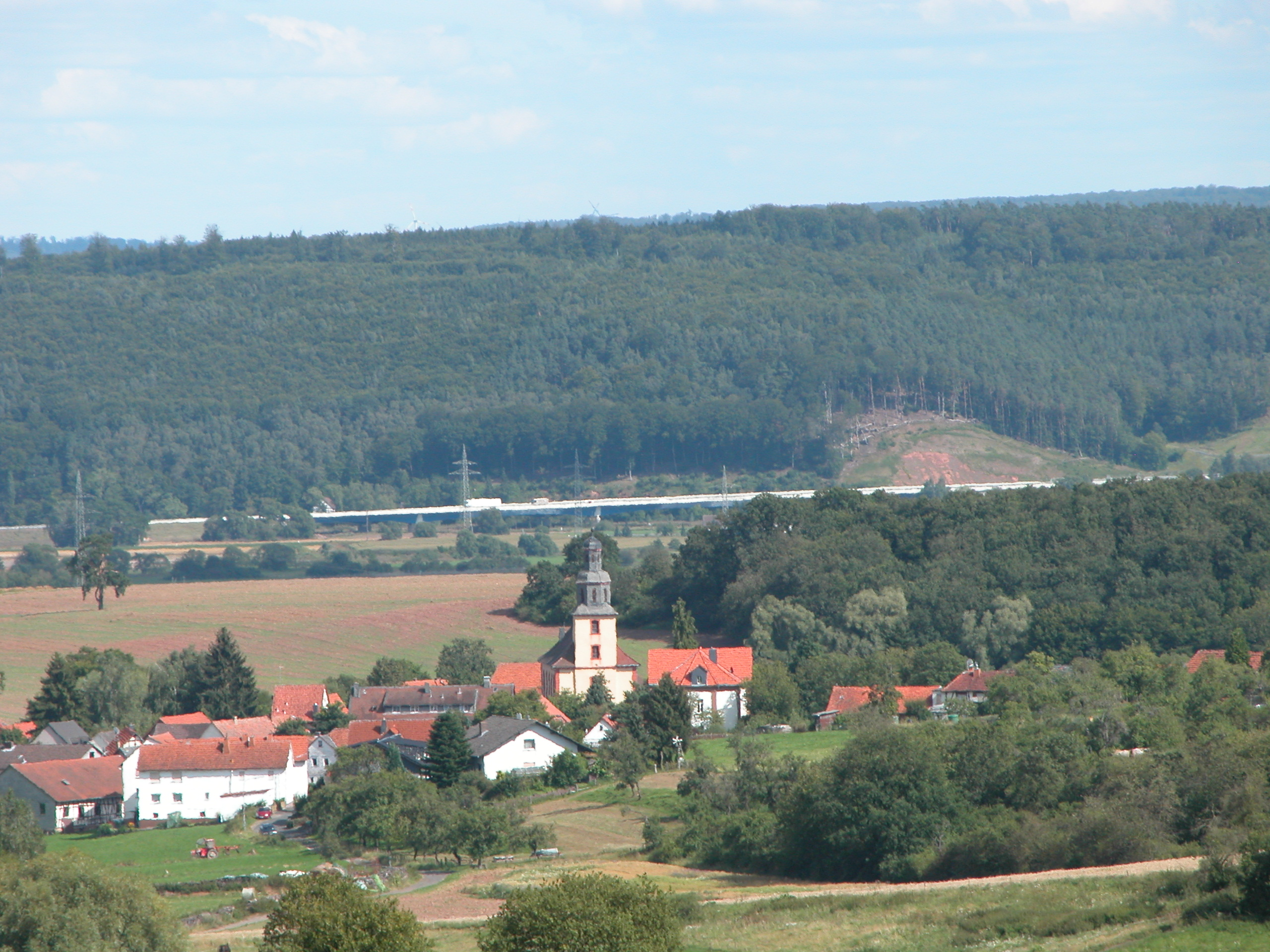 Oberweimar (Lahn) - alter Ortskern von Westen